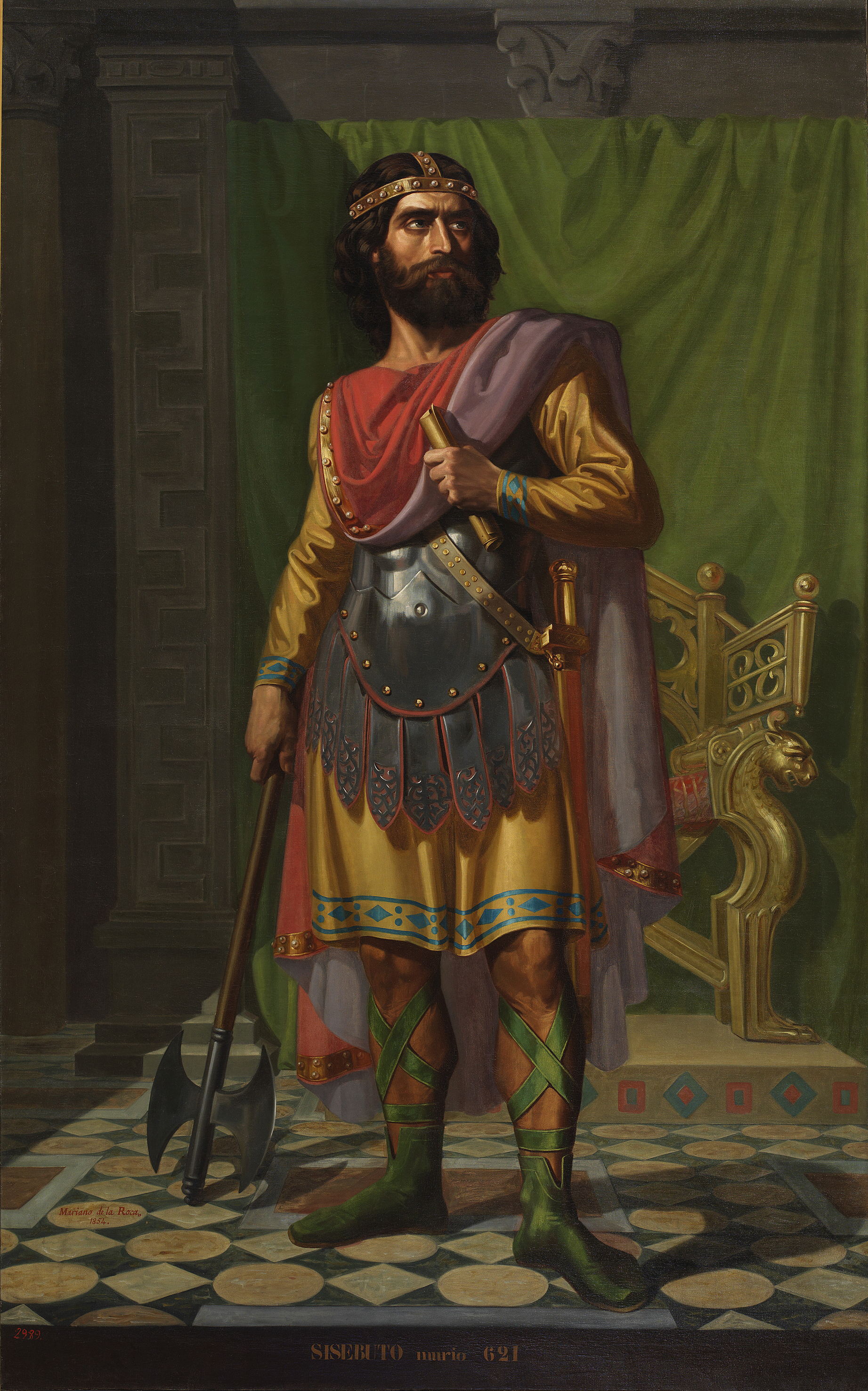 Retrato imaginario de Sisebuto († 621), que fue rey de los visigodos entre los años 612 y 621. Sucedió al rey Gundemaro y fue sucedido a su vez por su hijo, el rey Recaredo II. El rey Sisebuto aparece de frente, con media armadura y manto carmesí. LLeva en su mano izquierda un rollo de papel y en la derecha un hacha doble.